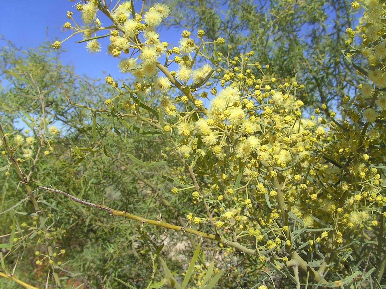 Acacia victoriae Menindee NSW BILD2702